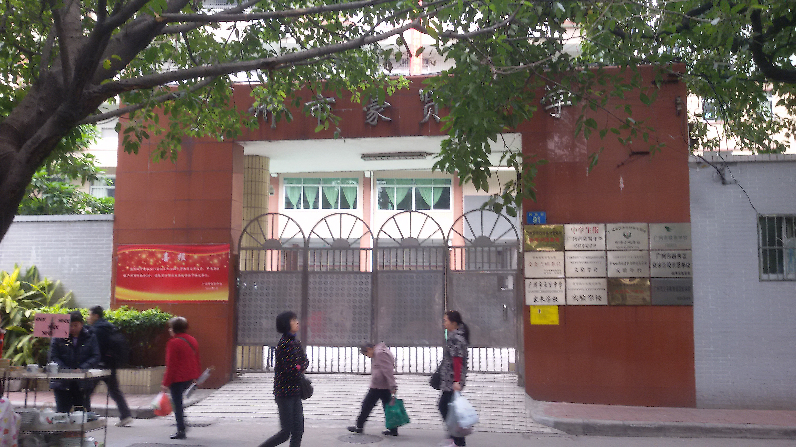 粵語: 廣州市豪賢中學嘅正門